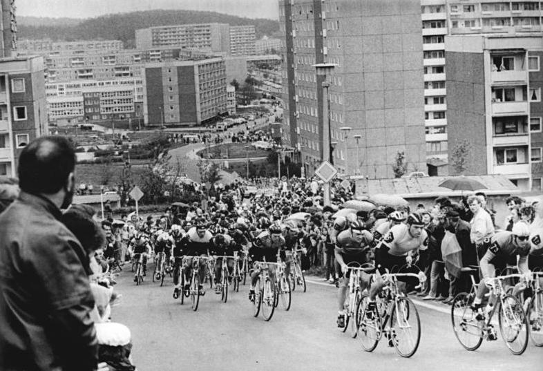 Gera, Friedensfahrt, Fahrerfeld, Zuschauer ADN-ZB Kasper 12.5.87-kb Gera: 40. Internationale Friedensfahrt-4. Etappe in Gera über 56 km-Das Feld am steilsten Anstieg des achtmal zu durchfahrenden 7-km-Kurses im Neubaugebiet Gera-Lusan. Wladimir Pulnikow (UdSSR) führt das Peleton an, 2.v.r.: der spätere Etappensieger Olaf Ludwig aus der DDR.